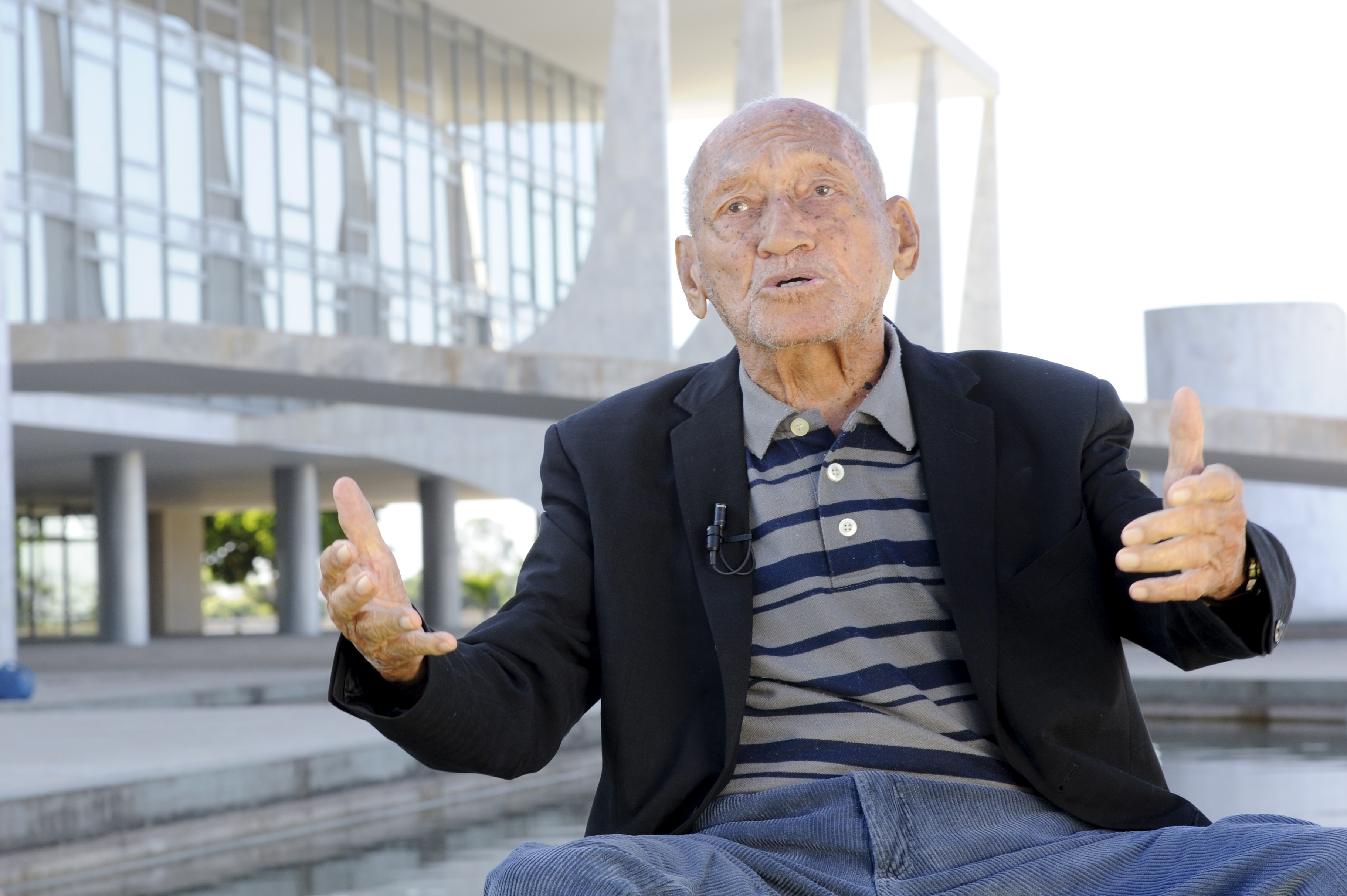 Documentário - Fotojornalista Gervásio Baptista concede entrevista para documentário da TV Senado. Foto: Leopoldo Silva/Agência Senado